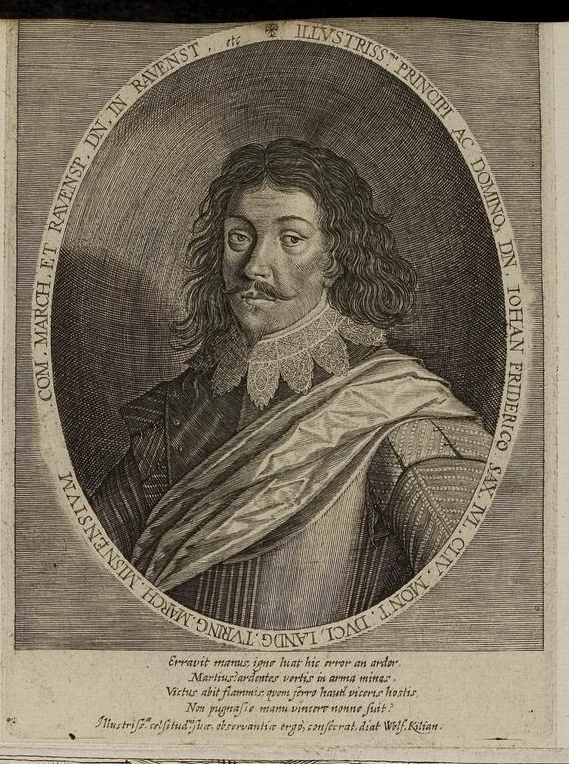 Grafik aus dem Klebeband Nr. 1 der Fürstlich Waldeckschen Hofbibliothek Arolsen Motiv: Herzog Johann Friedrich von Sachsen-Weimar